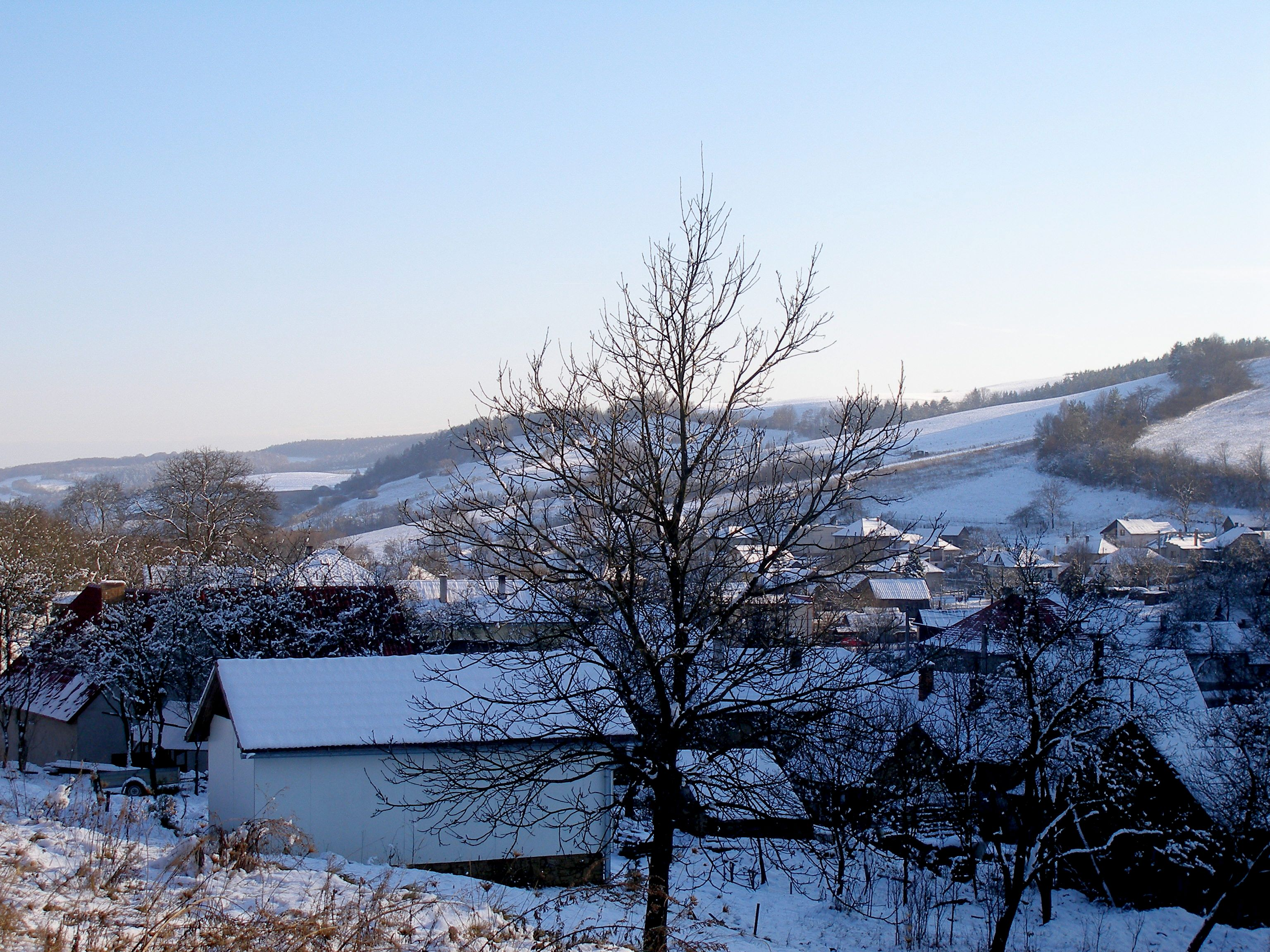 Prvý sneh v obci Brežany, okres Prešov, Šarišská vrchovina. 17.11.2007